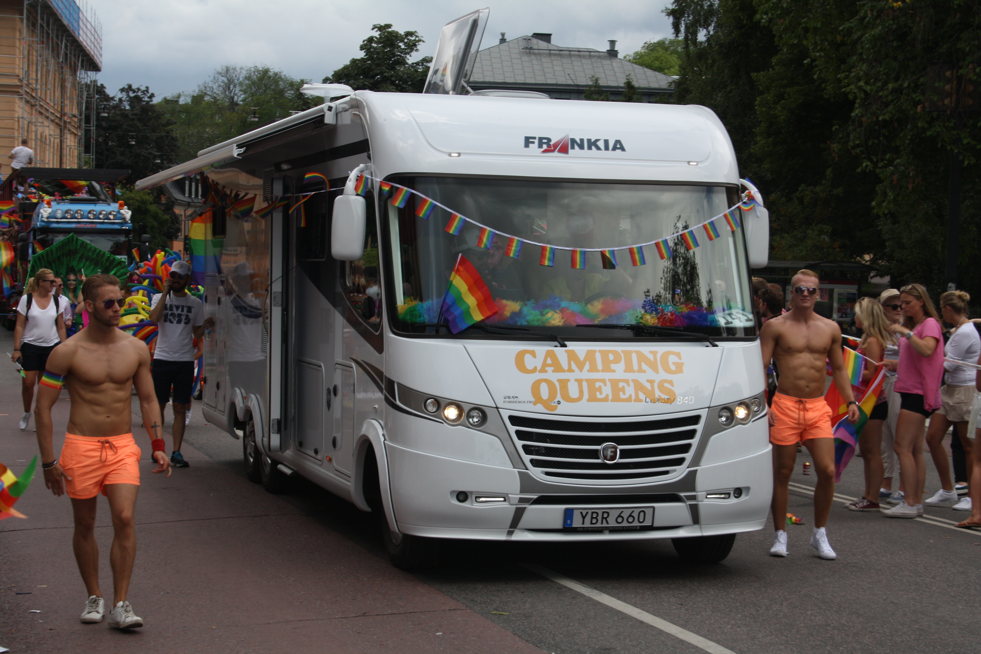 Camping queens-husvagnen